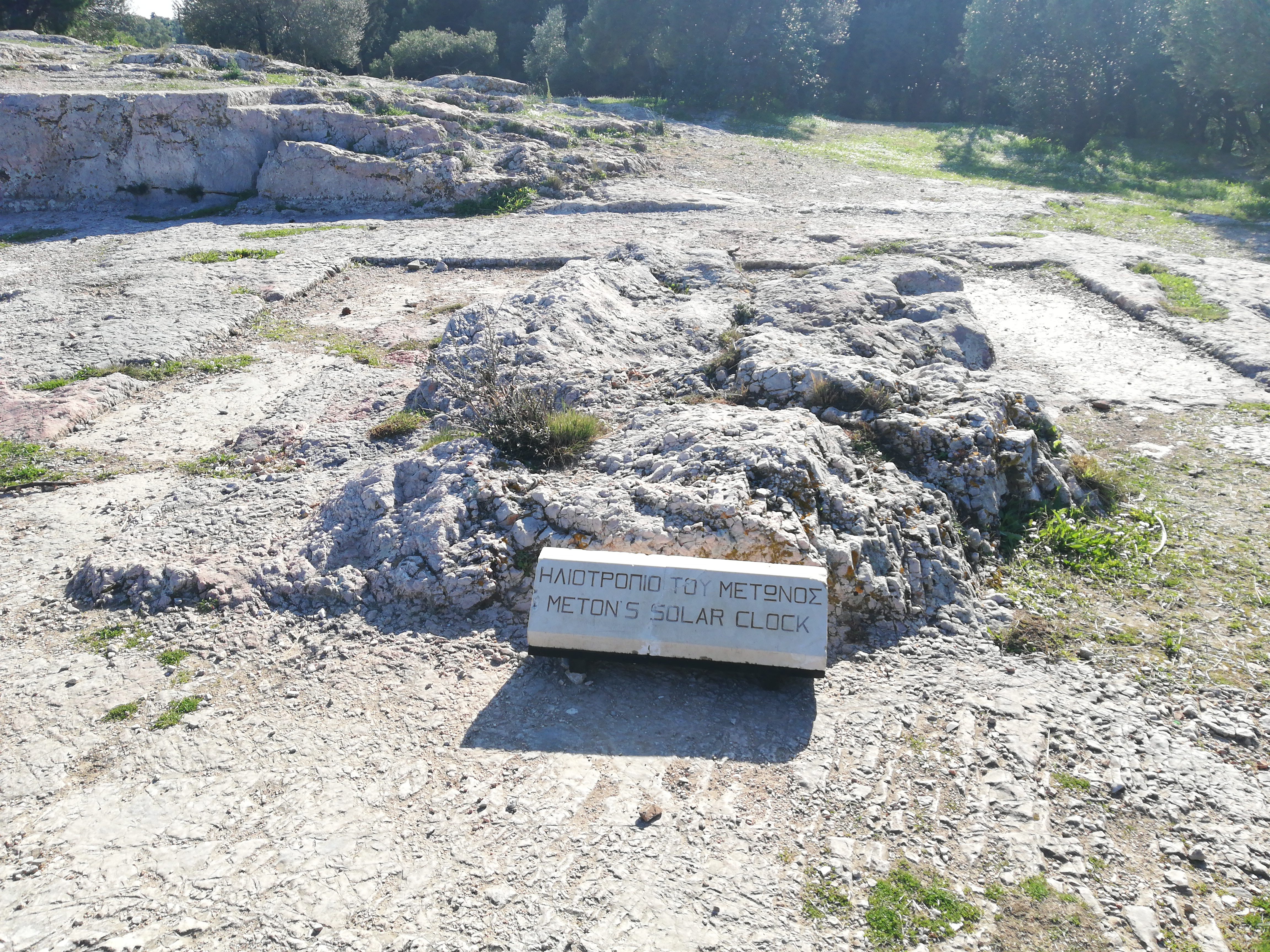 Lieu où Méton d'Athènes installa son Horloge solaire (gnomon), deuxième moitié du Ve siècle avant notre ère.